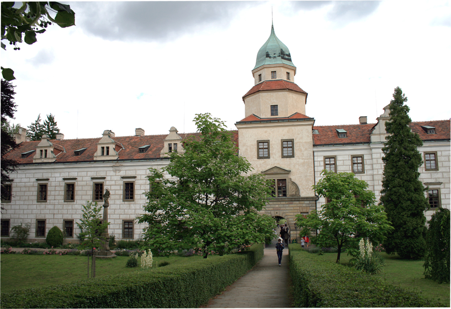 Častolovice castle, east Bohemia, Czech republic zámek Častolovice, východní Čechy photo July 2007 Author= Karelj